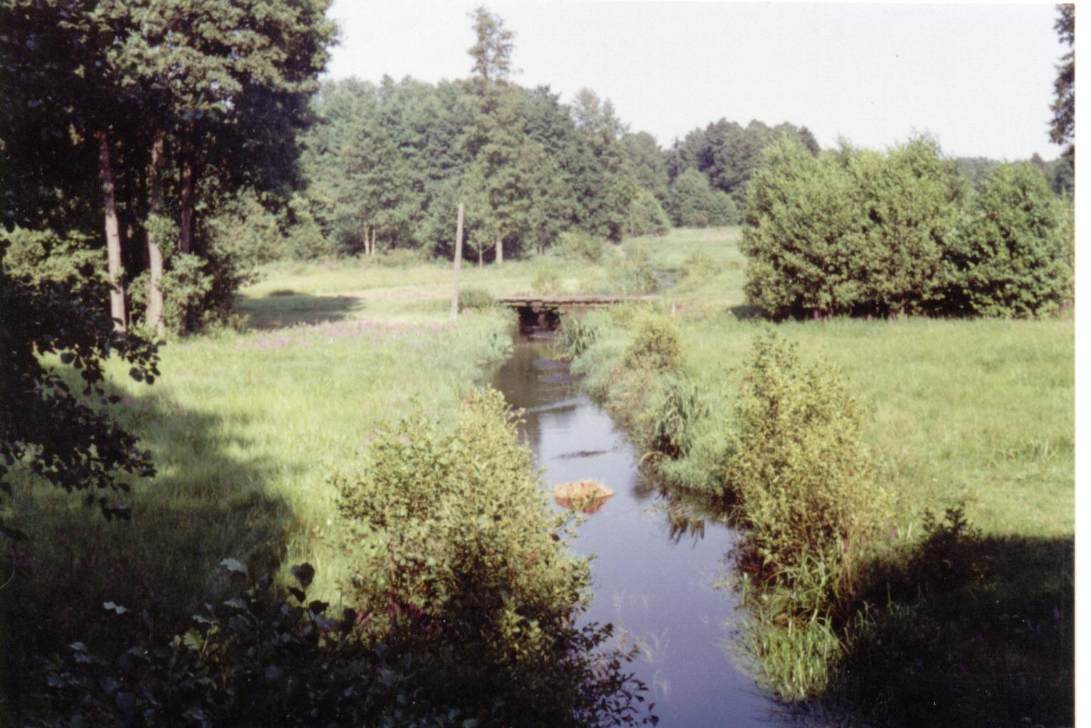 Rzeczka i łaki w pobliżu wsi Strzemeszna (powiat tomaszowski)